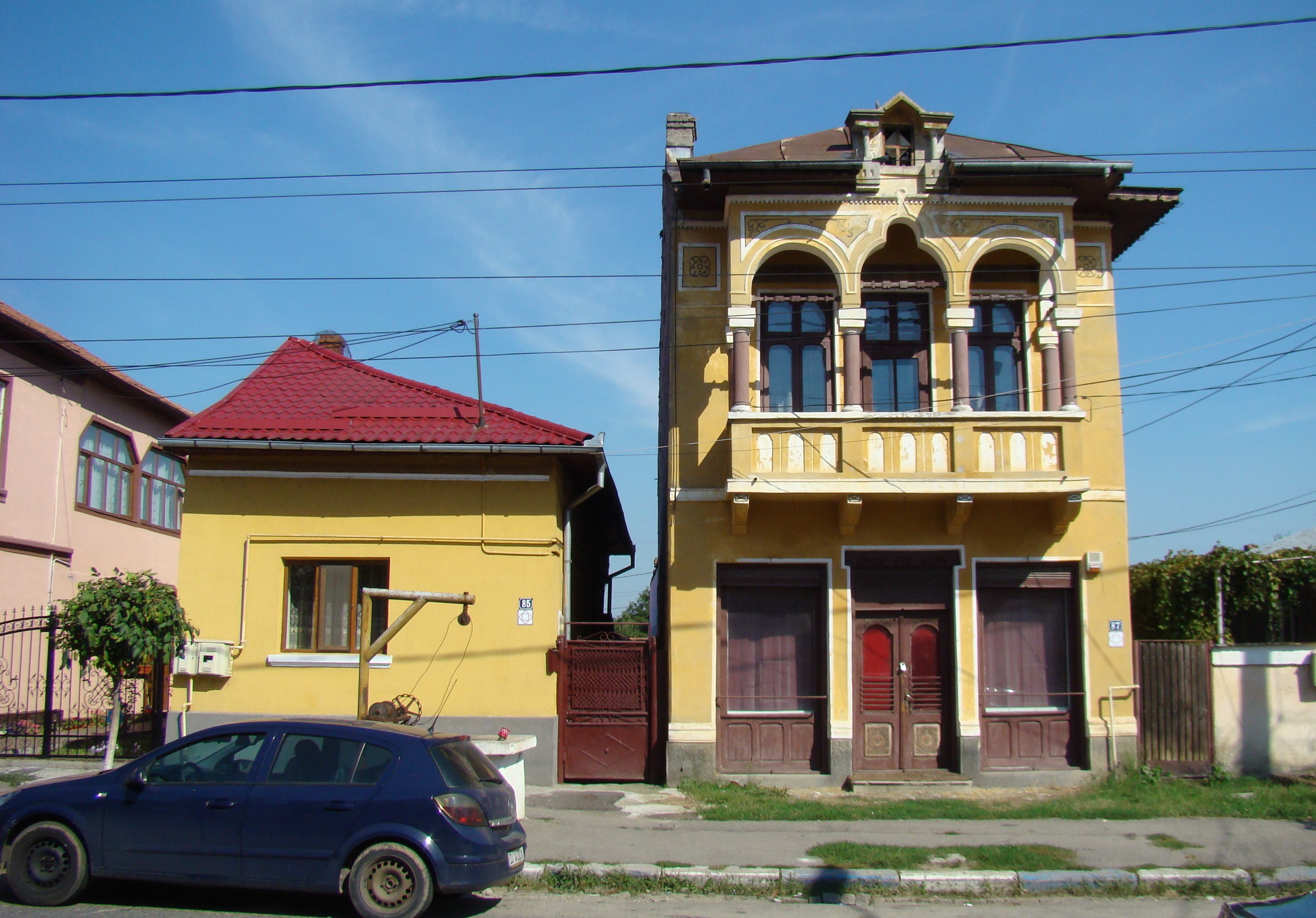 Ansamblu urban, oraș Târgu Cărbunești, Str. Trandafirilor